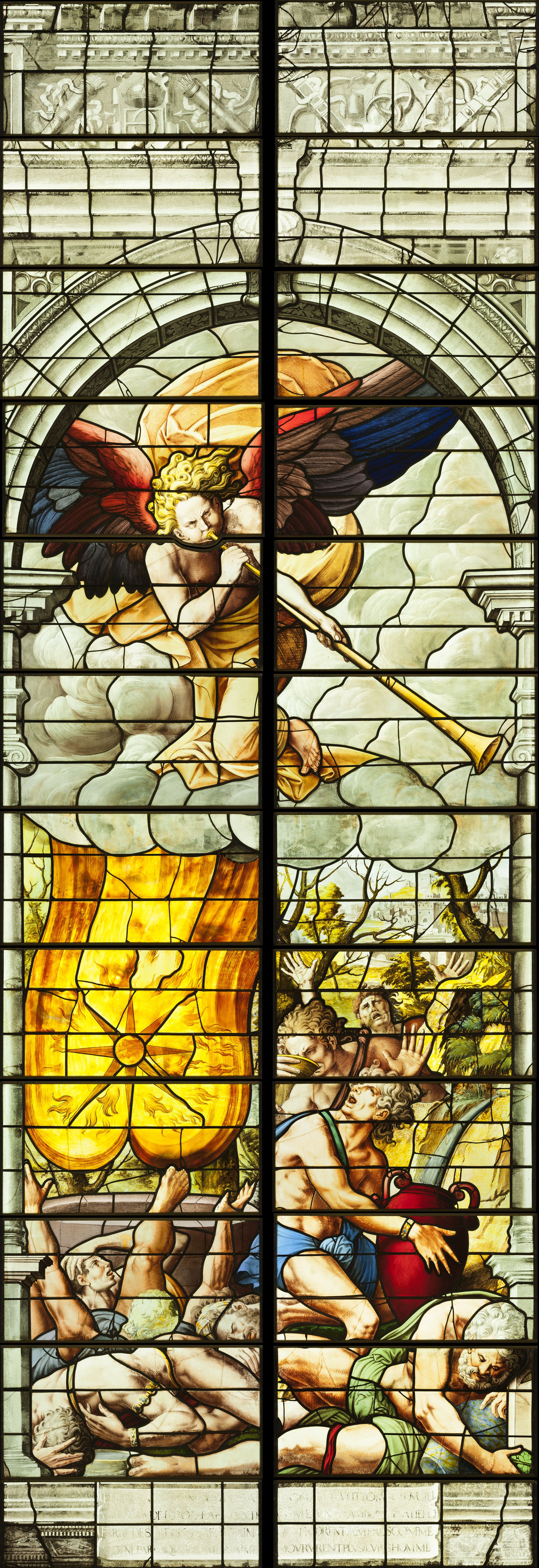 Montage présentant le registre supérieur de la baie 1 de l'abside.